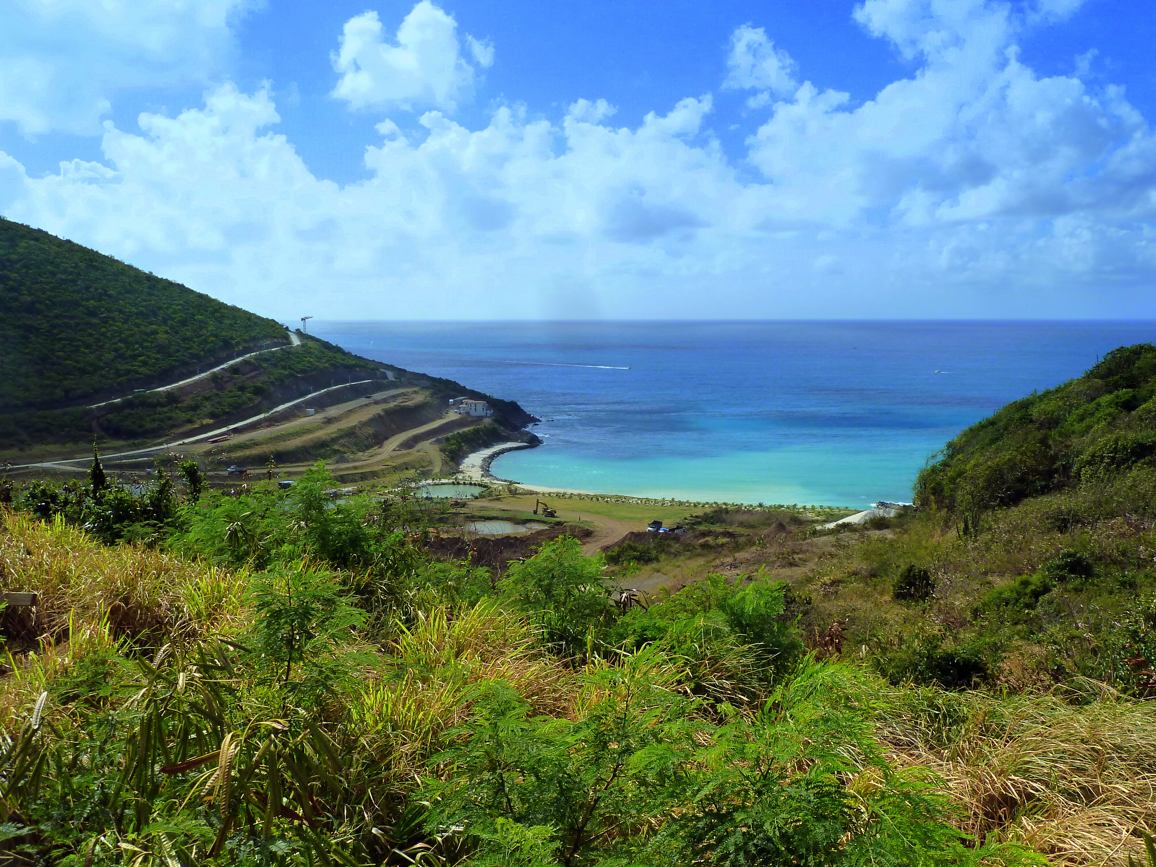 St. Maarten, Karibik - Cay Bay